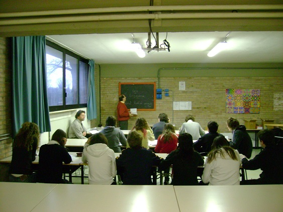 Kurso de esperanto en Capannori